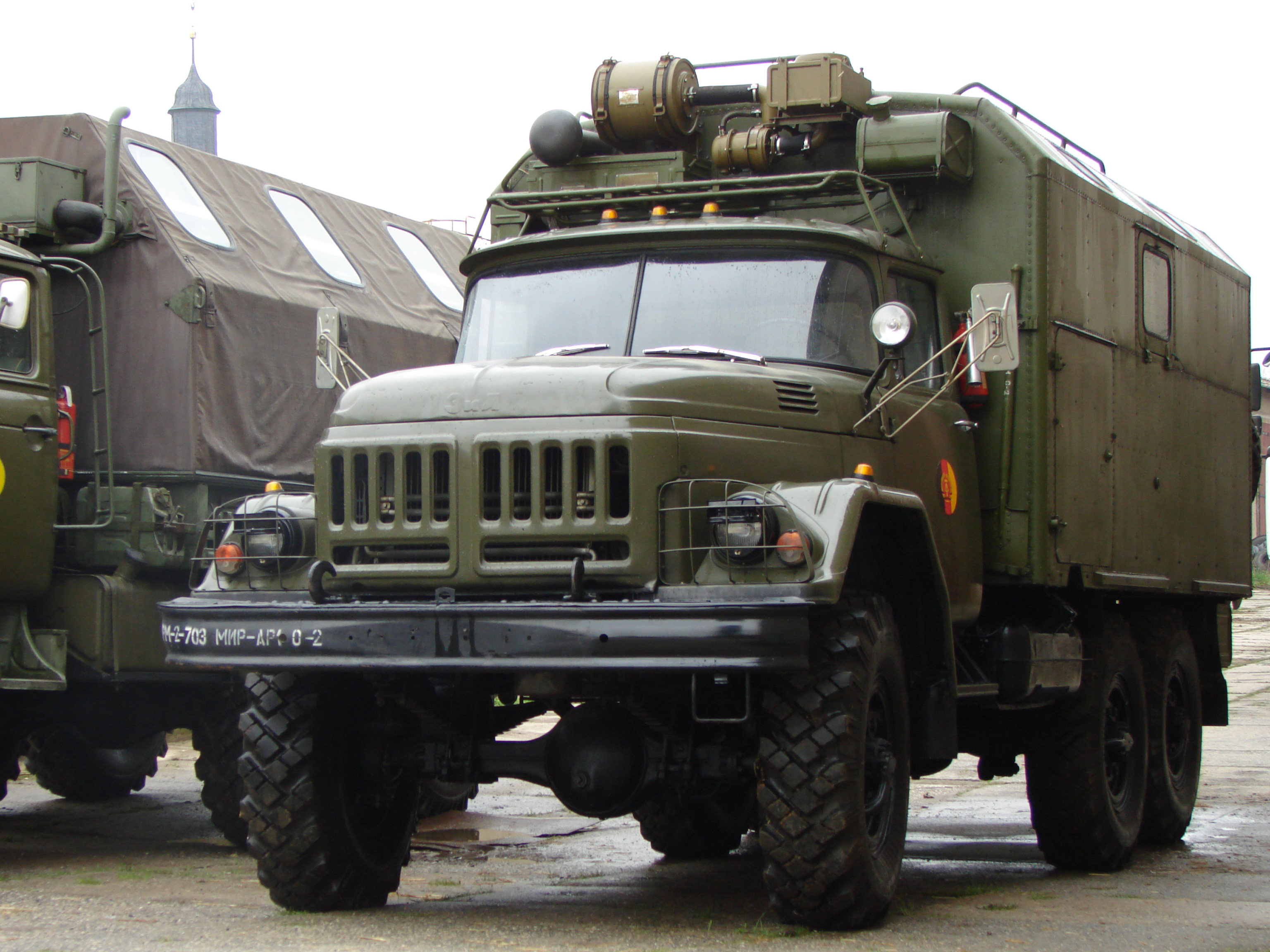 Zil-131 der ehemaligen NVA (heute in Privatsammlung)